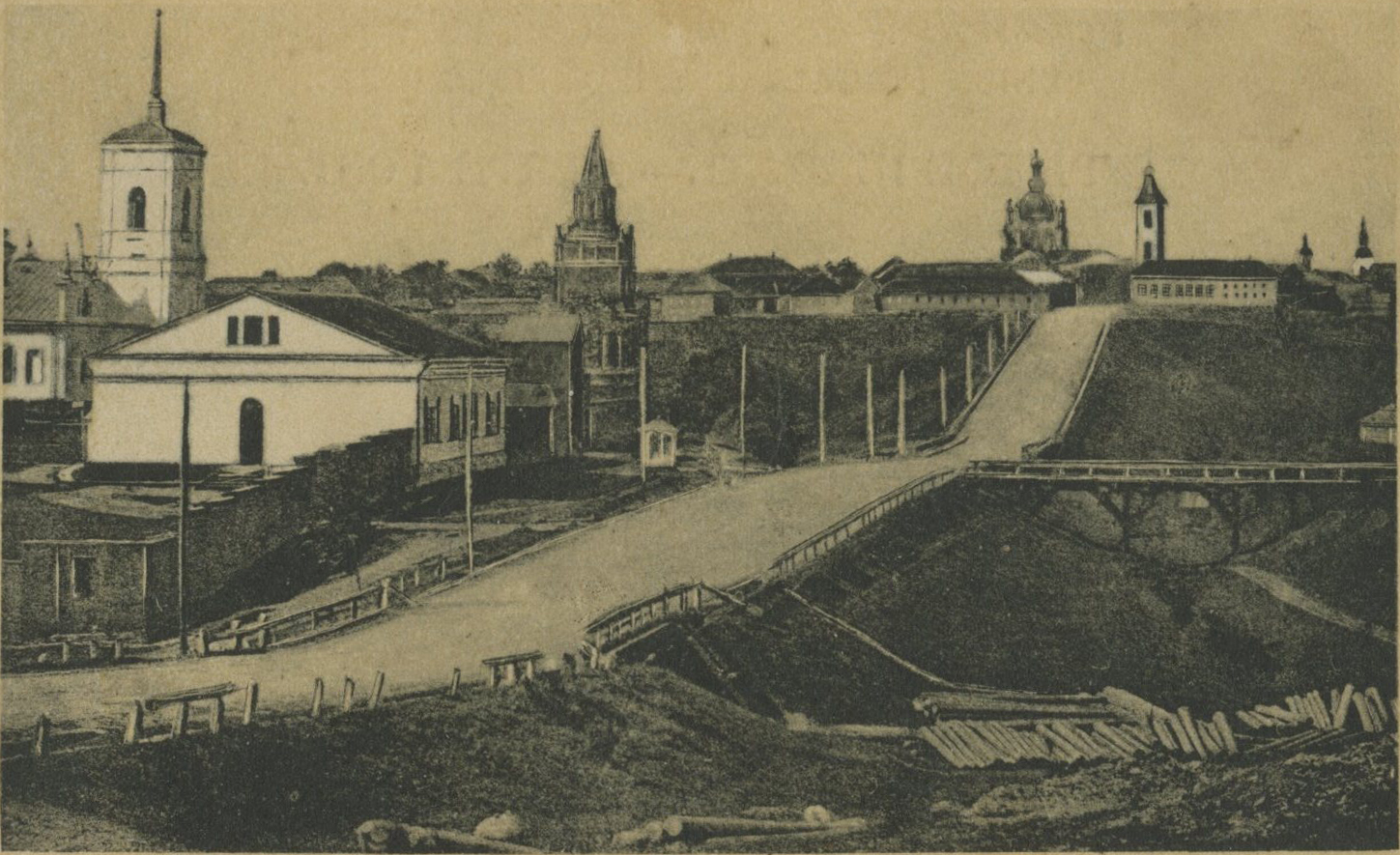 Беларуская (тарашкевіца): Рослаў (Rosłaŭ). Агульны выгляд места